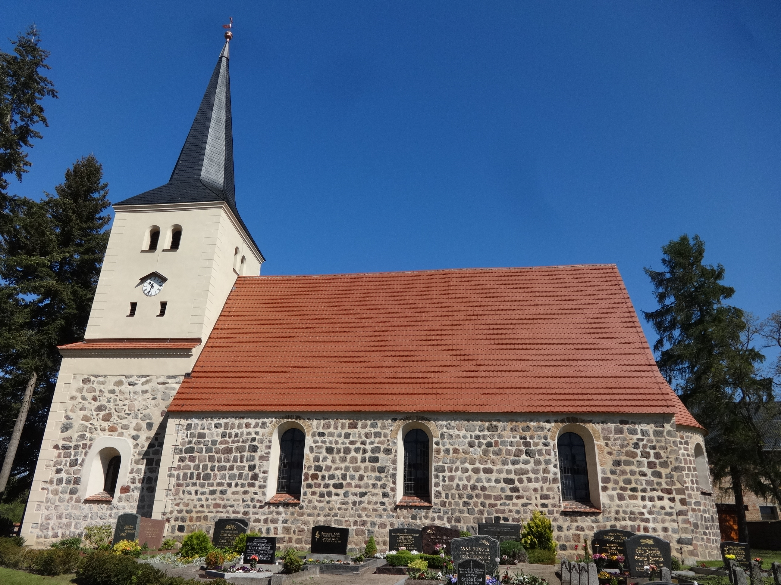 Die im Ursprung romanische Dorfkirche Siethen entstand im späten 13. oder frühen 14. Jahrhundert als Rechteckbau mit nachträglich angebauter Apsis. Im Innern befindet sich eine qualitätsvolle Ausstattung mit Kanzel, Altarretabel sowie Wappenschildern.